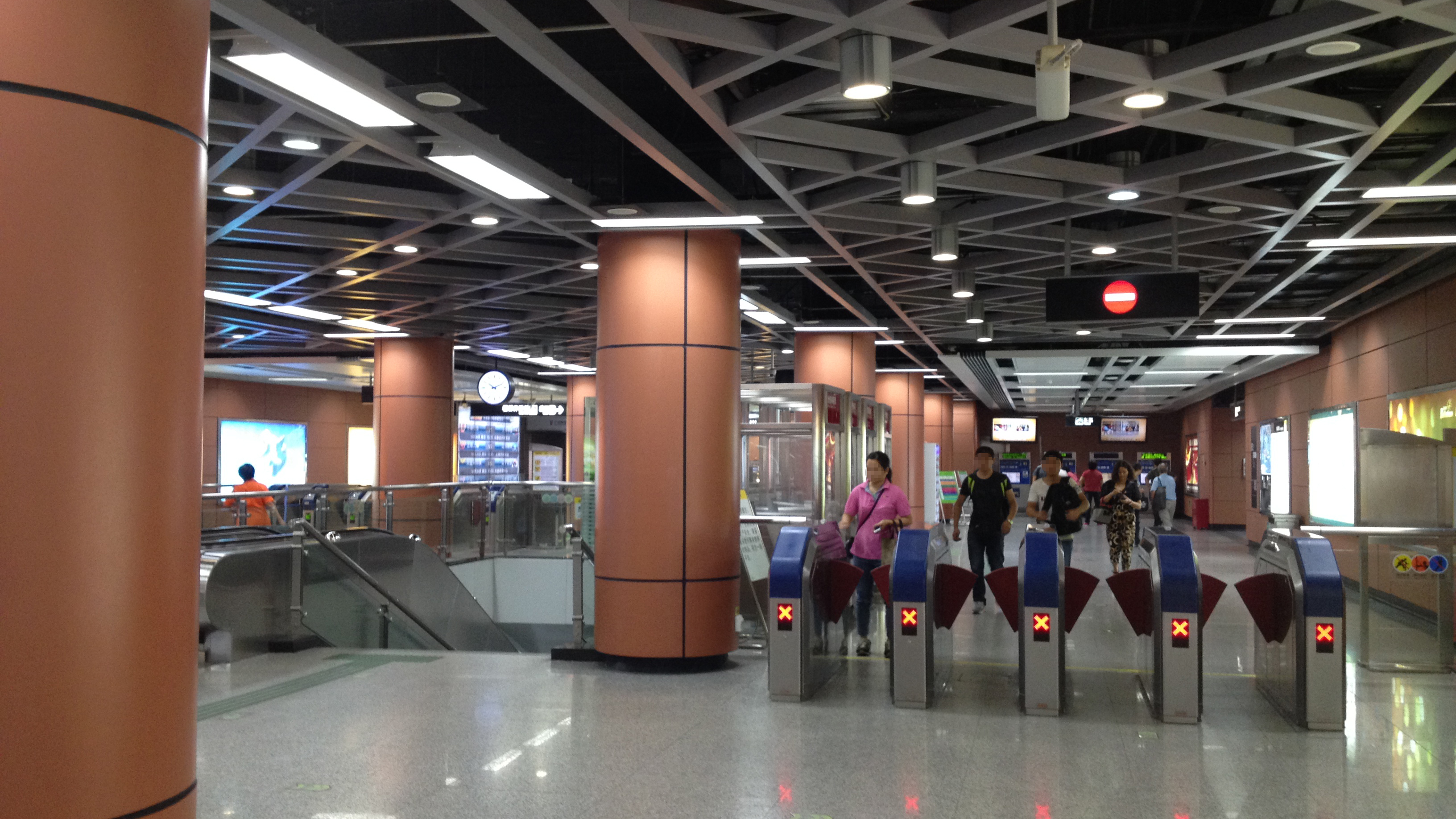 广佛地铁桂城站站厅